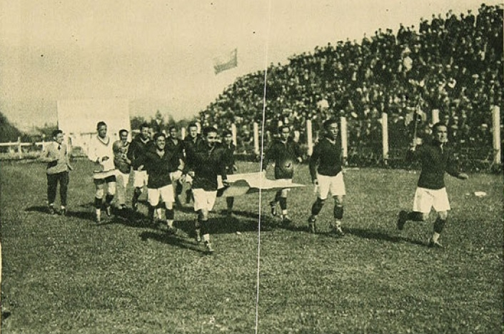 La Selección Chilena de fútbol entra a la cancha de los Campos de Sports, 1926. En Los Sports. Santiago : Zig-Zag, 1923-1931. 8 volúmenes, año 4, número 192, (12 noviembre 1926), página 3